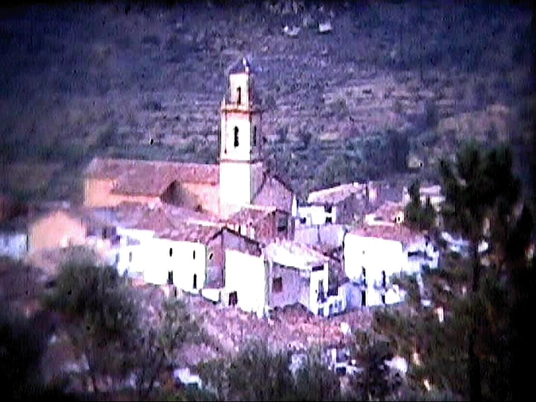 Panorámica de Campos de Arenosos (fotograma capturado de Super 8)